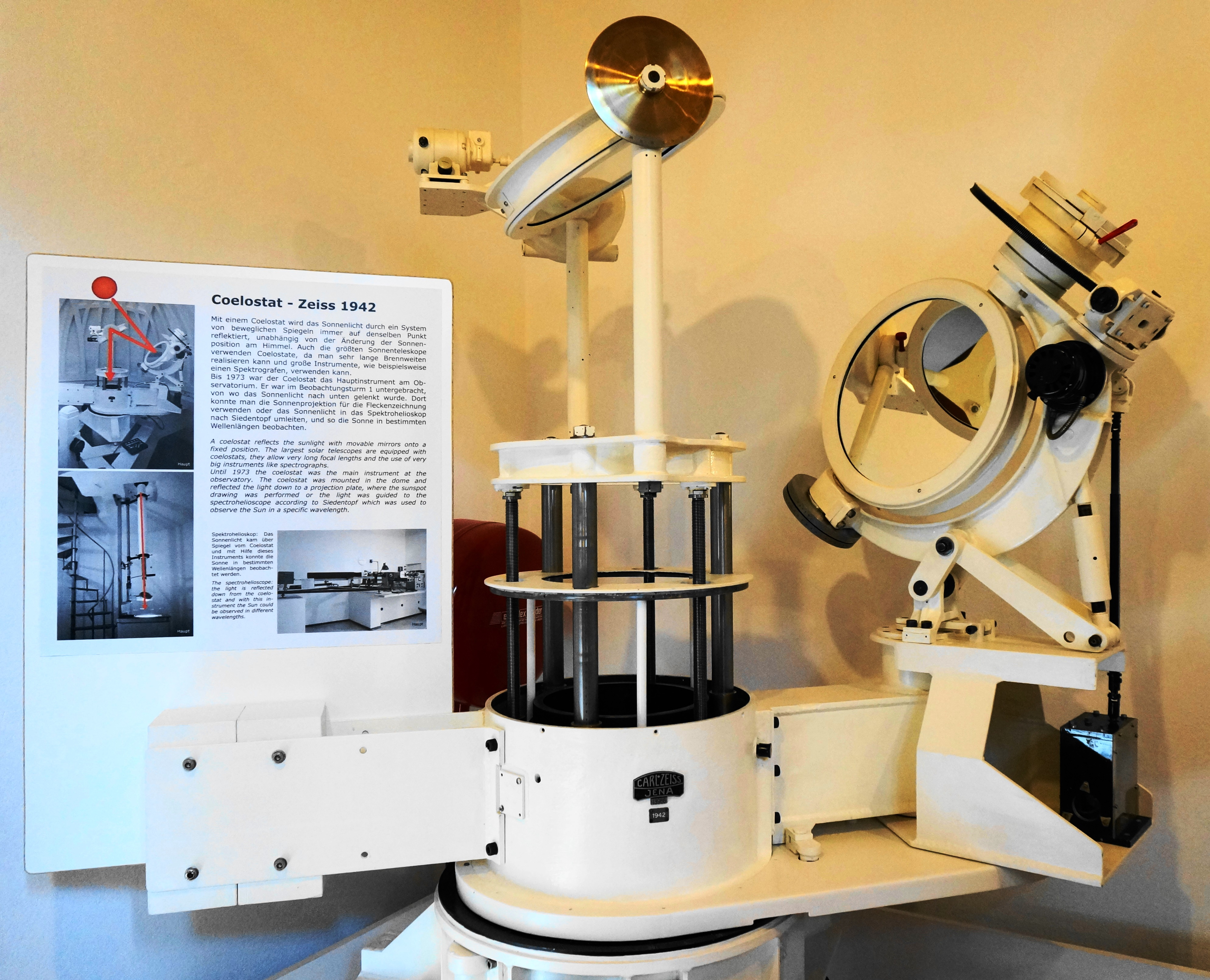 Coelostat Zeiss 1942 - Instrument für die Sonnenbeobachtung mit beweglichen Spiegeln, das bis 1973 auf der "Kanzelhöhe" Gerlitzen, Villach, Kärnten verwendet wurde. Mit einem Coelostat wird das Sonnenlicht durch ein System von beweglichen Spiegeln immer auf denselben Punkt reflektiert, unabhängig von der Änderung der Sonnenposition am Himmel. Auch die größten Sonnenteleskope verwenden Coelostate, da man sehr lange Brennweiten realisieren kann und große Instrumente, wie beispielsweise einen Spektrografen, verwenden kann. Bis 1973 war der Coelostat das Hauptinstrument am Observatorium auf der Kanzelhöhe Gerlitzen. Er war im Beobachtungsturm 1 untergebracht, von wo das Sonnenlicht nach unten gelenkt wurde.